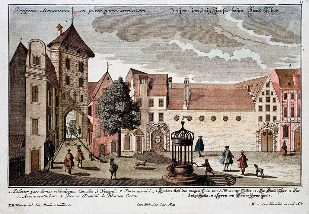 Brama Piaskowa (#2) i Arsenał Piaskowy (#4) we Wrocławiu, ok. 1730 r.